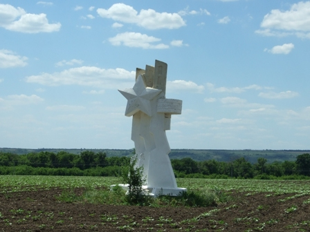 Придорожный знак "Линия Миус-фронта", установленный вдоль федеральных дорог на всей его протяженности, от Донбасса до Азовского моря